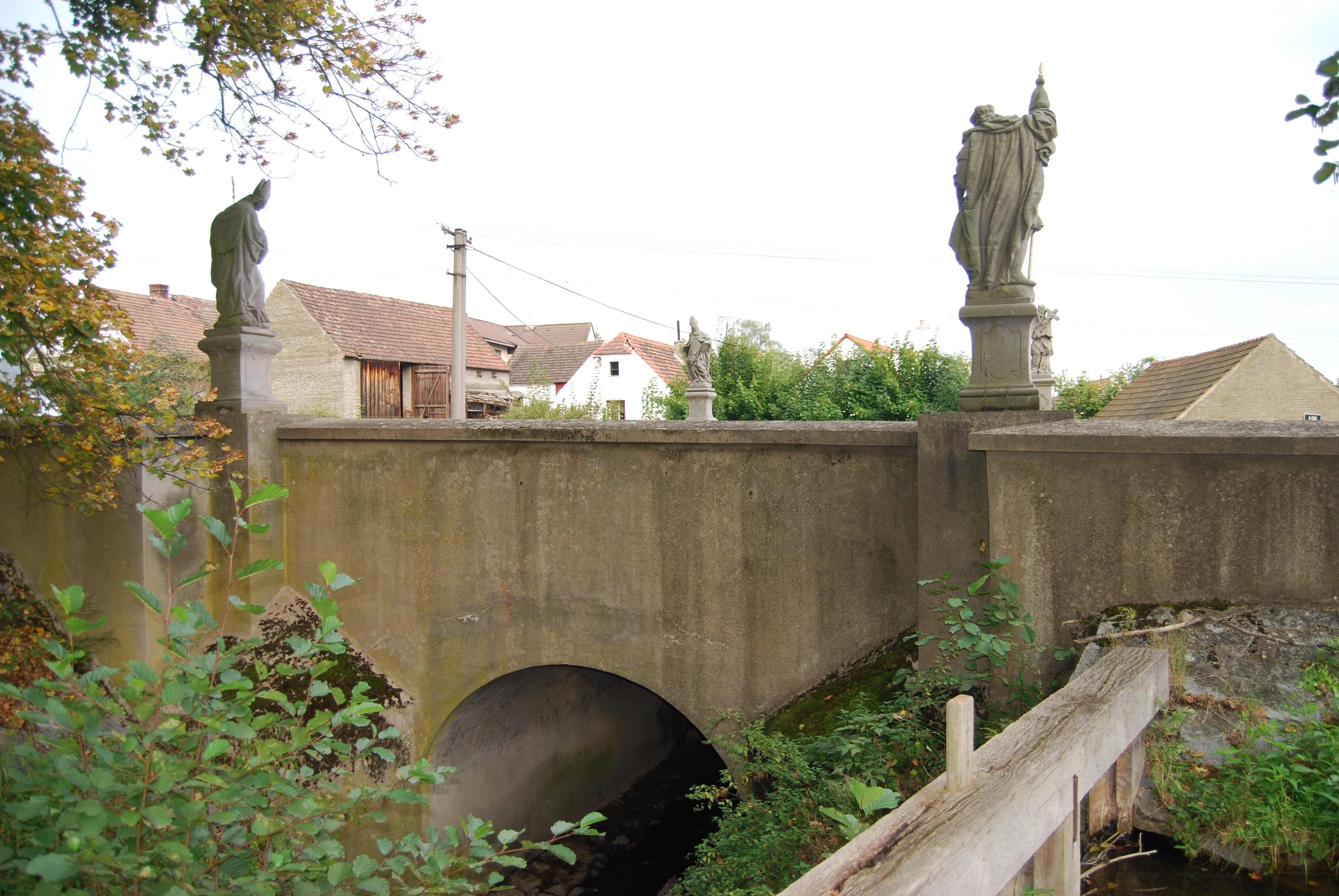 Silniční most se sochami přes Kostelní rybník v obci. Čimelice. Okres Písek. Česká republika.